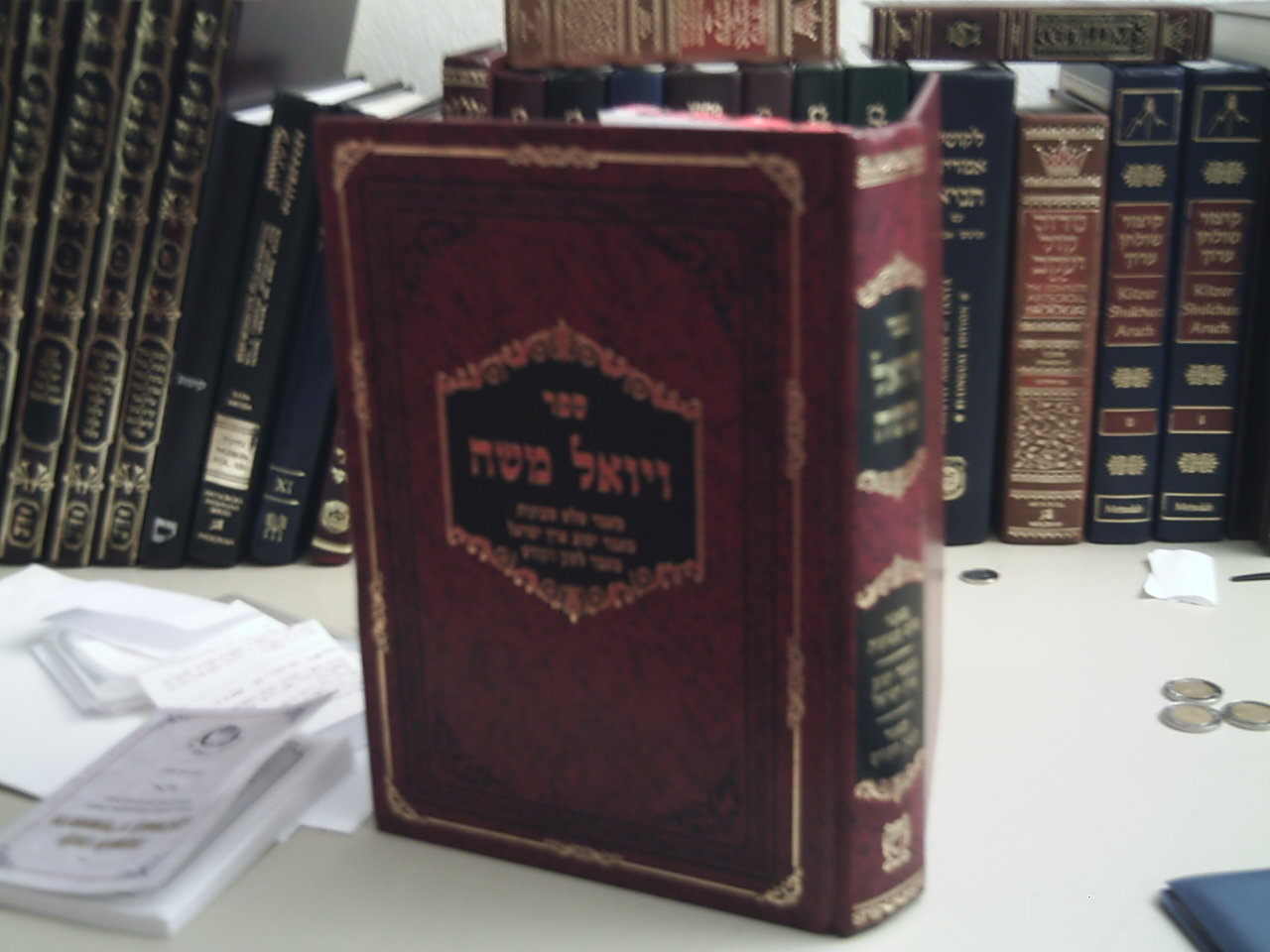 Het boek Vayoel Moshe. Zelf gemaakt.